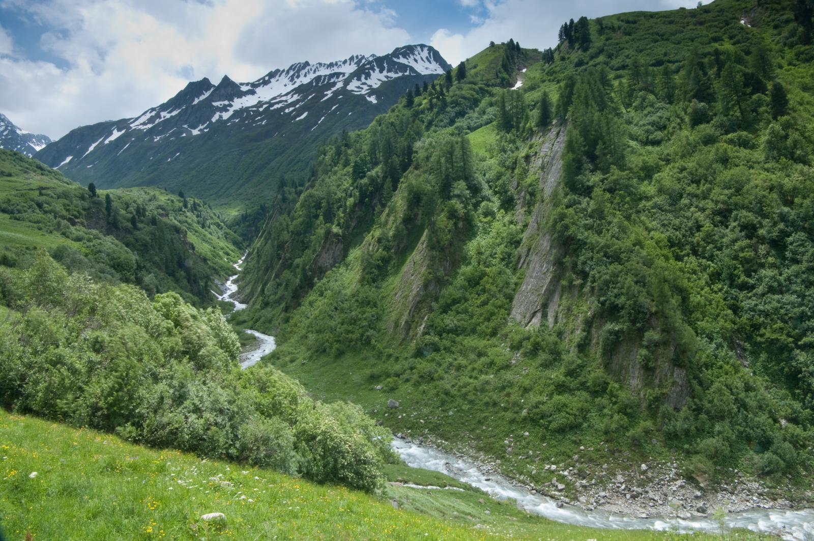 Dranse de Ferret (Val Ferret), Valais